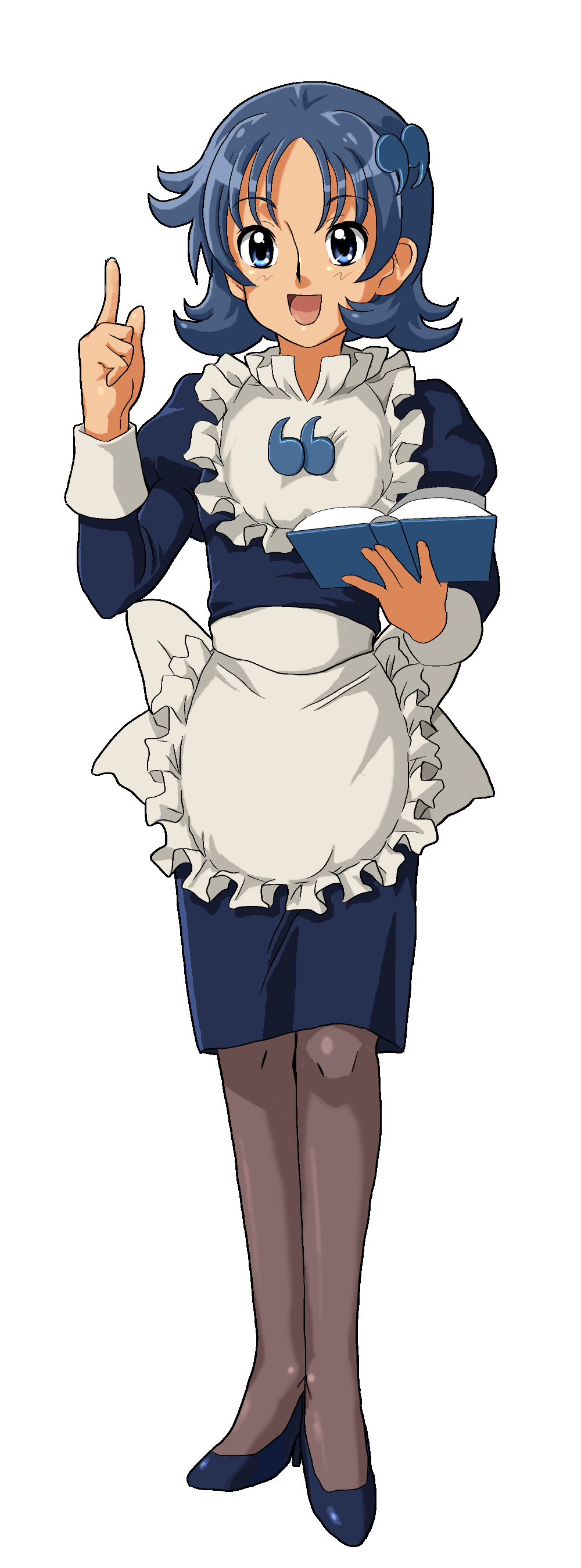 Quote-tan as an adult